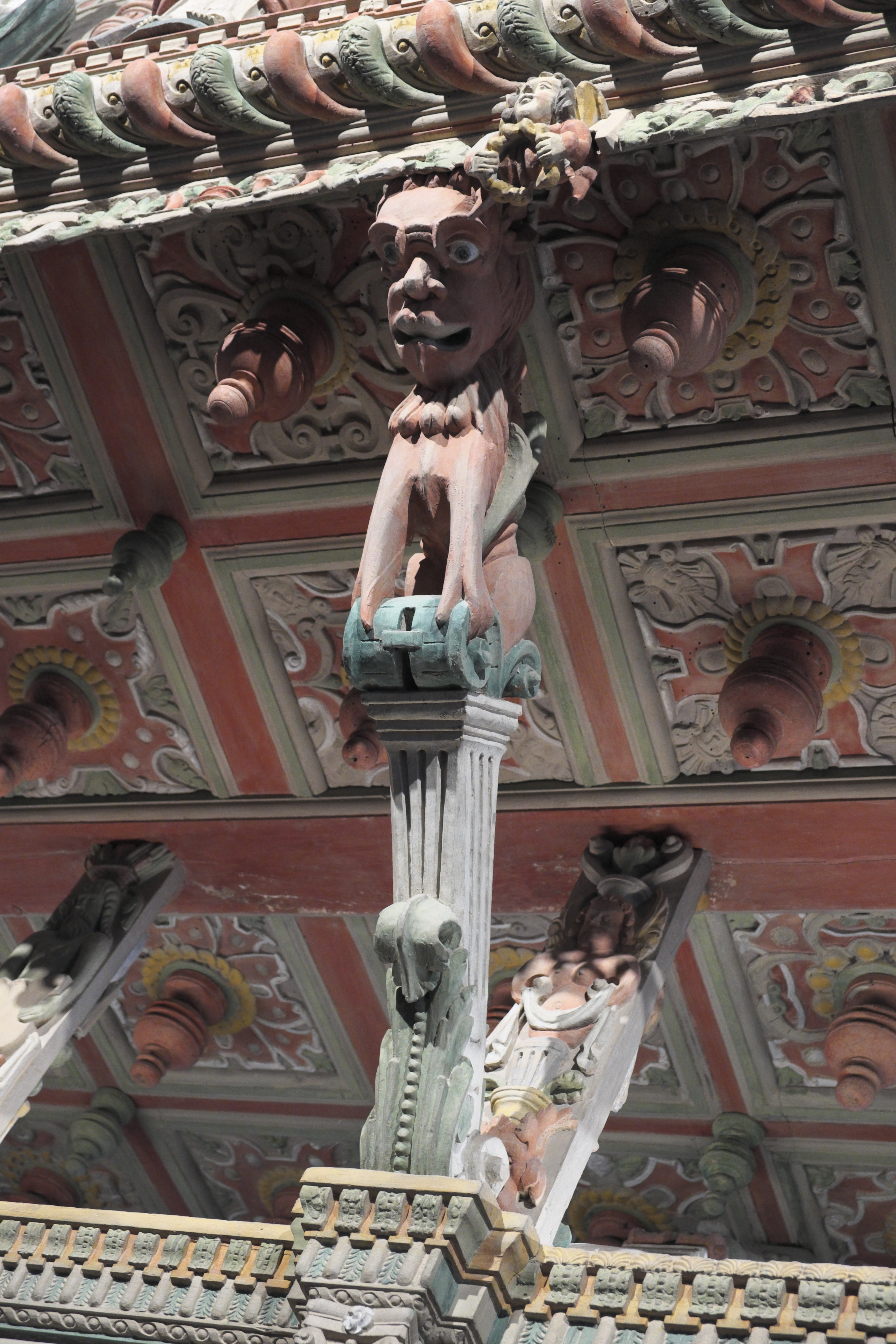 Katholische Pfarrkirche Saint-Yves in La Roche-Maurice im Département Finistère (Region Bretagne/Frankreich), Lettner von 1560